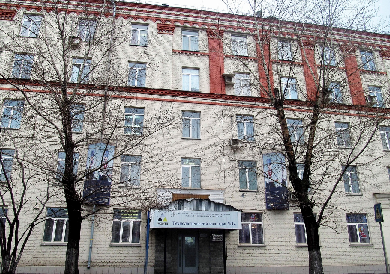 ГБОУ СПО Технологический колледж №14 - Подразделение Мурманский проезд. Факультет Ресторанный бизнес.